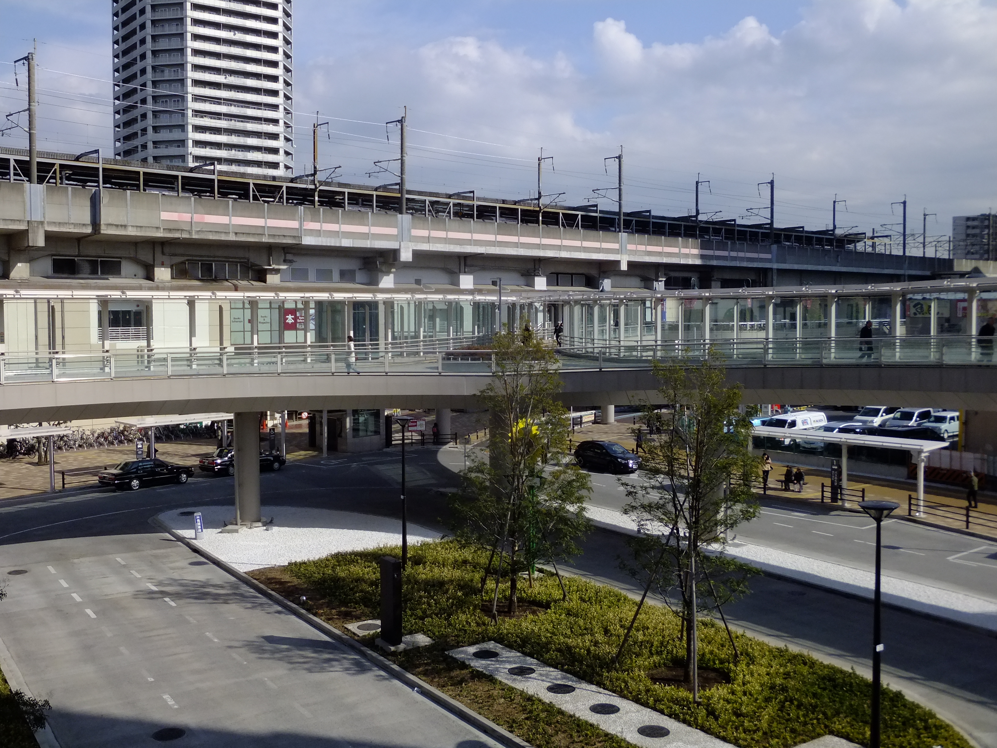 埼京線・武蔵野線・武蔵浦和駅西口ロータリー